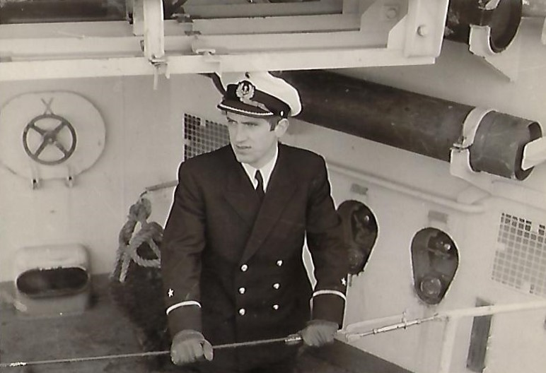 Oberfähnrich zur See auf Zerstörer Hamburg in der Kaiserschleuse Bremerhaven